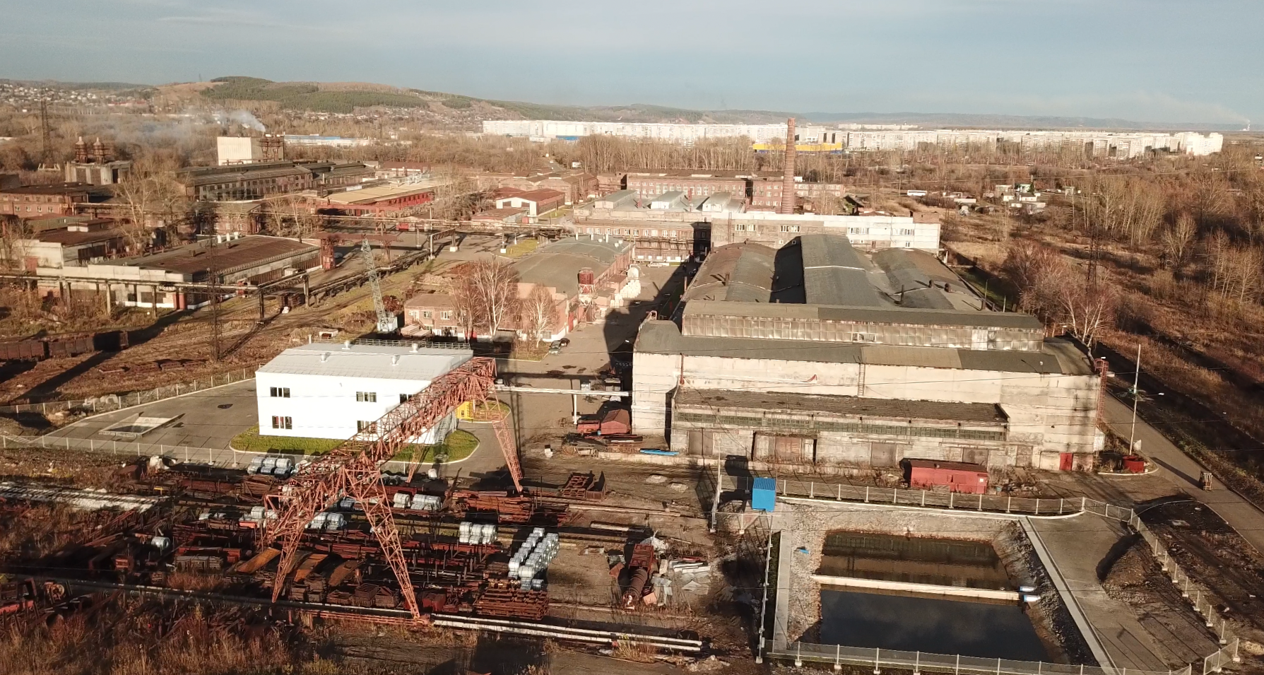 Территория АО Завод Универсал осенью